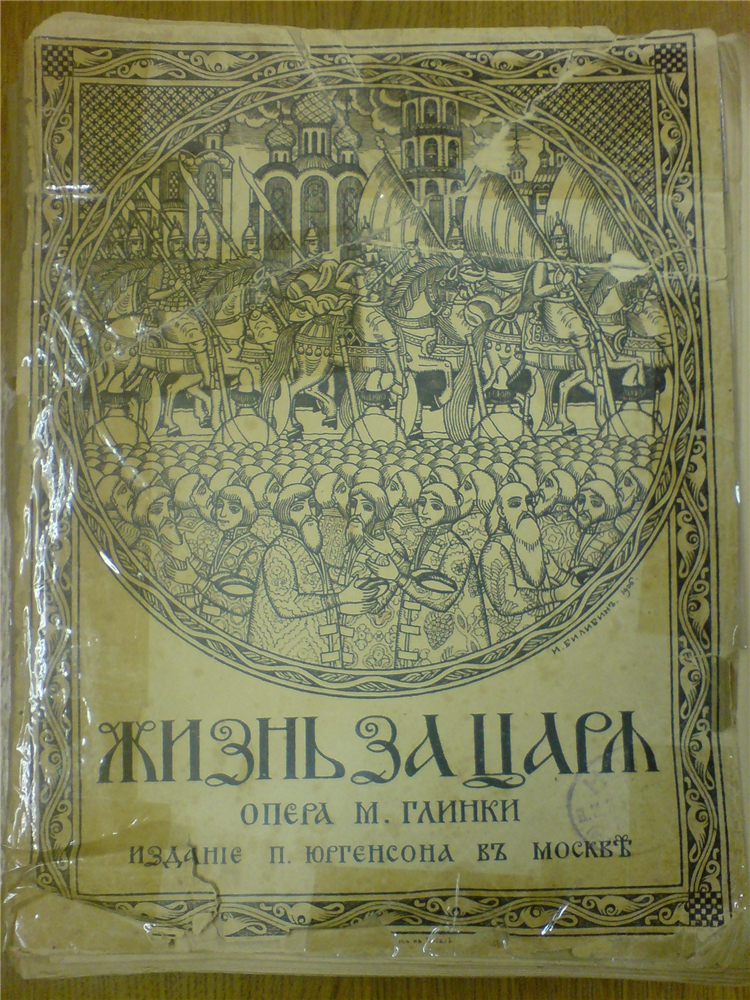 Обложка клавира оперы М. И. Глинки «Жизнь за царя». Издание П. Юргенсона, Москва